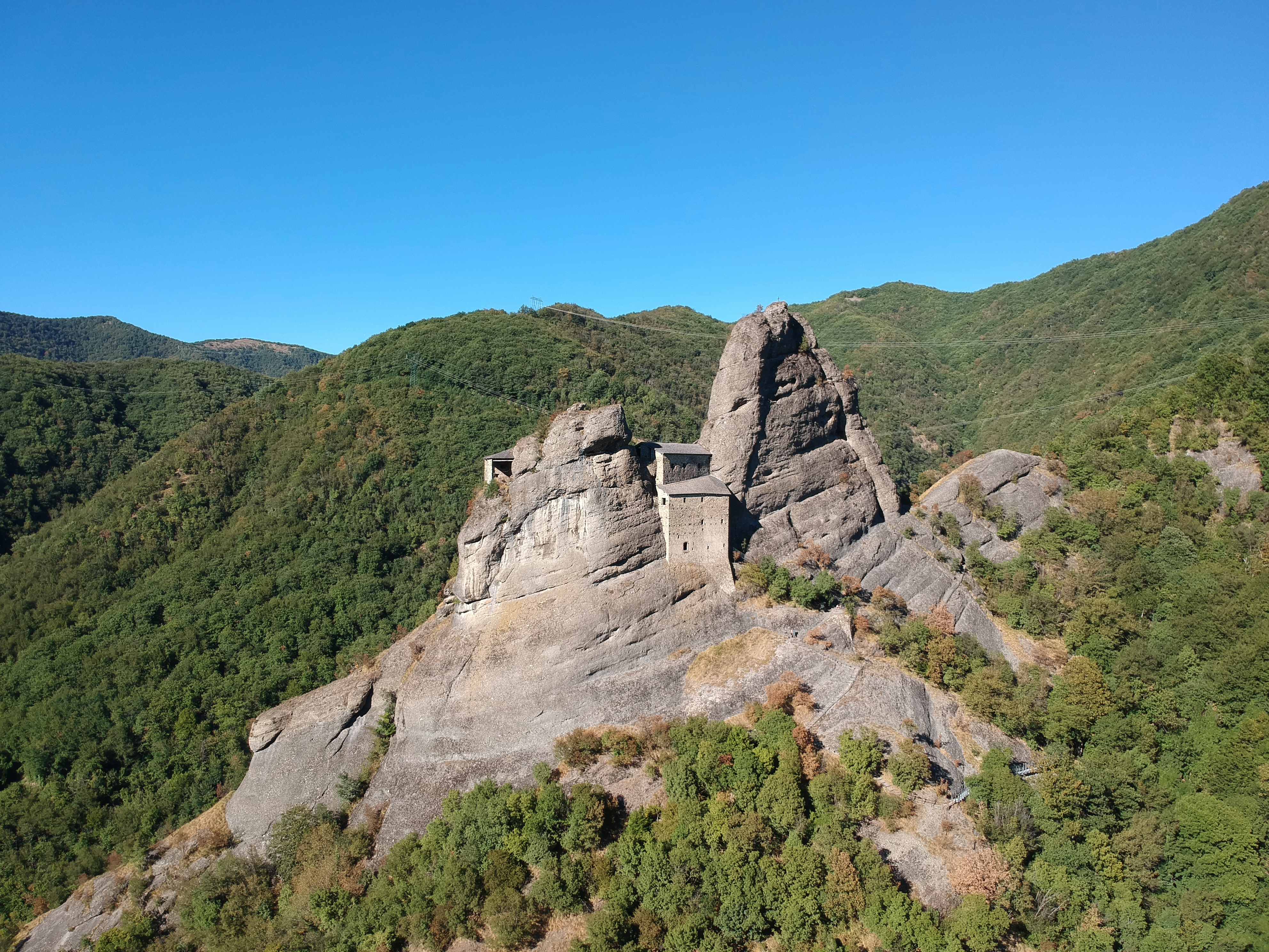 Ligure: O castéllo da prìa visto da l'äto